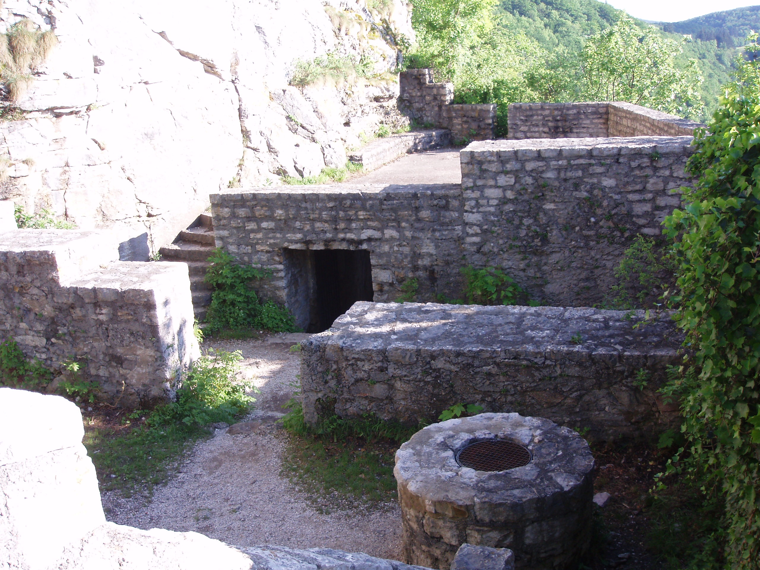 Ruine Reußenstein